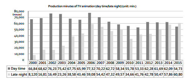 Thời lượng anime giữa day time và late night, tính theo phút